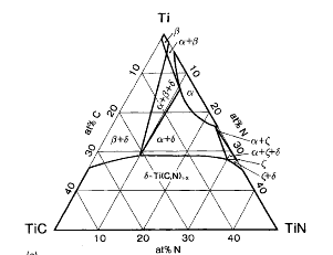 دیاگرام